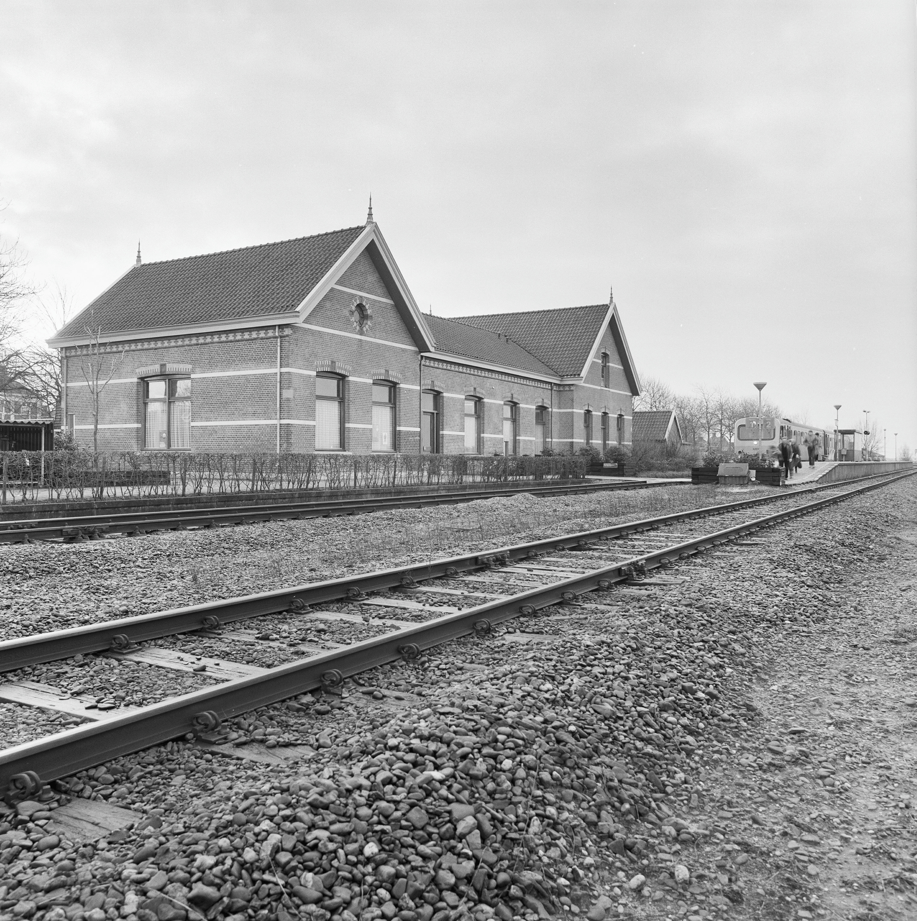 N.S. STATION: Exterieur PERRONZIJDE